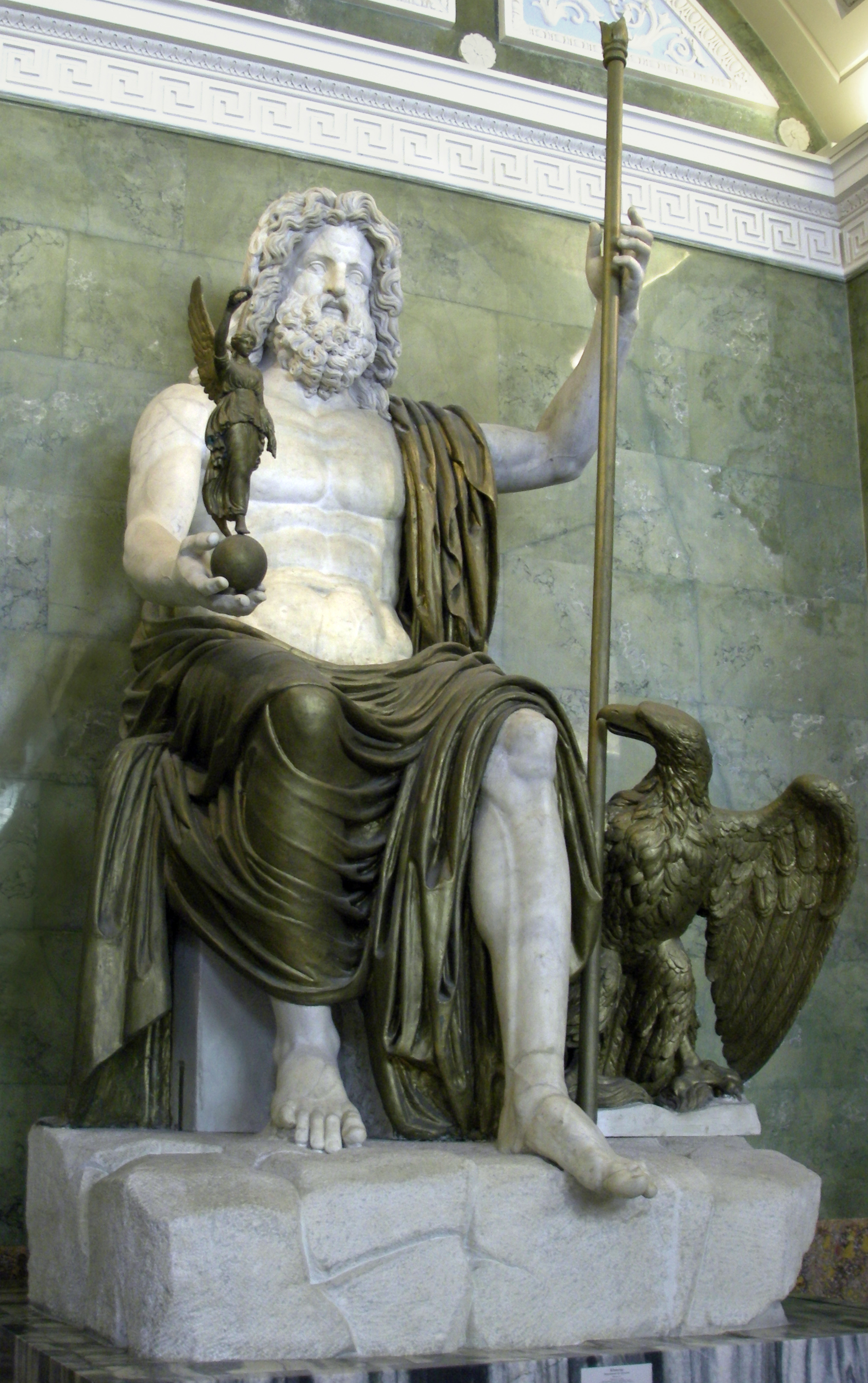 Юпитер. Верховный бог римлян. Конец I в. Мрамор, А 362. Драпировки, жезл, фигуры орла и Виктории - тонированный гипс, XIX в. Эрмитаж, зал Юпитера. Санкт-Петербург, Россия.